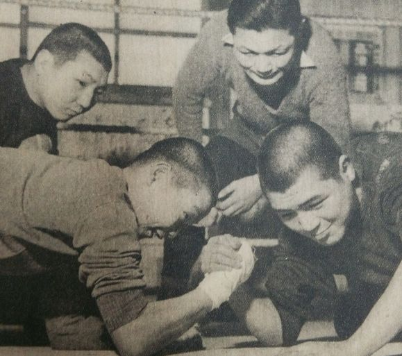 左から、堀口基治（次兄）・喬久（末弟）・恒男（長兄）・宏（次弟）